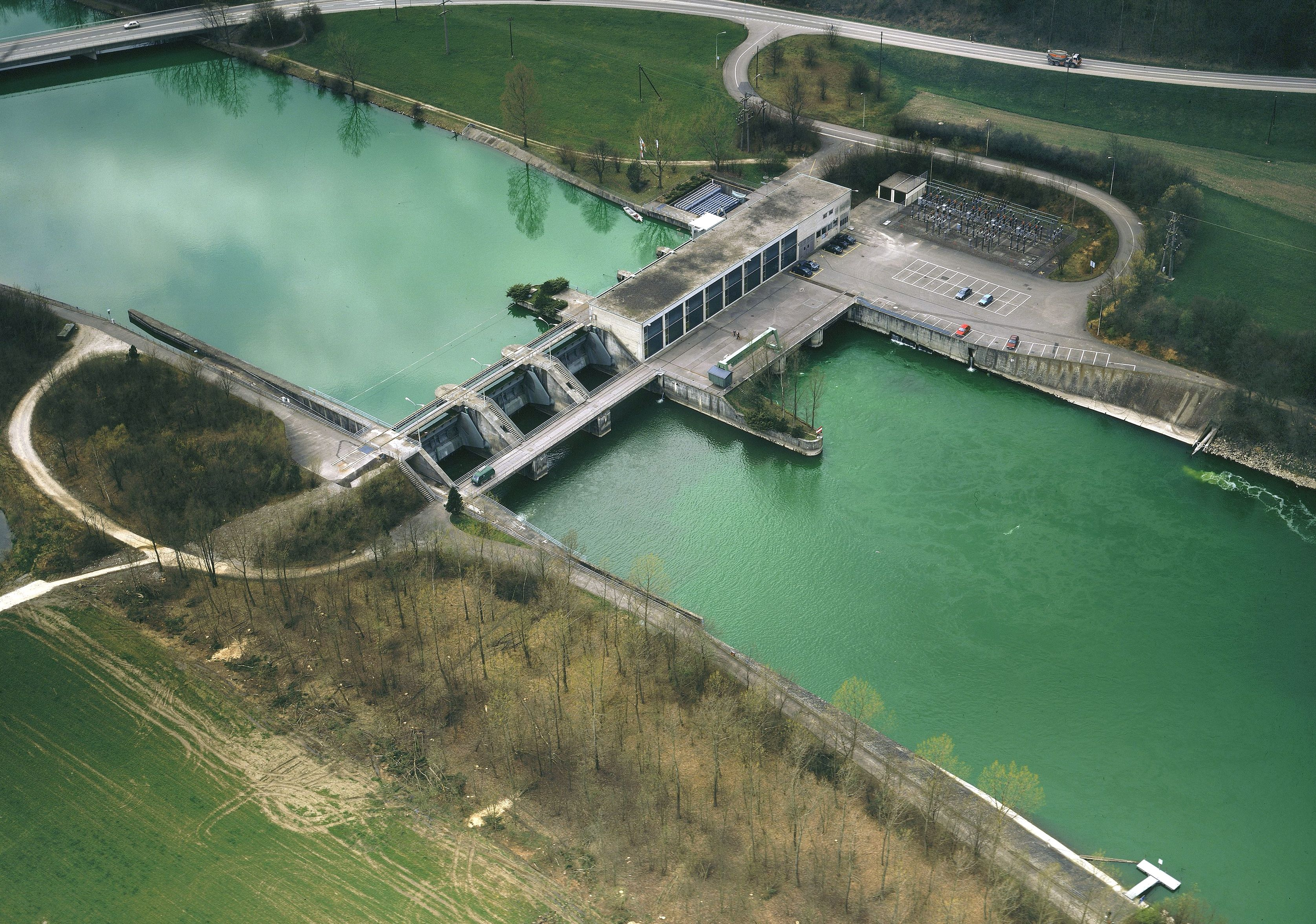 Tiefgeflogen